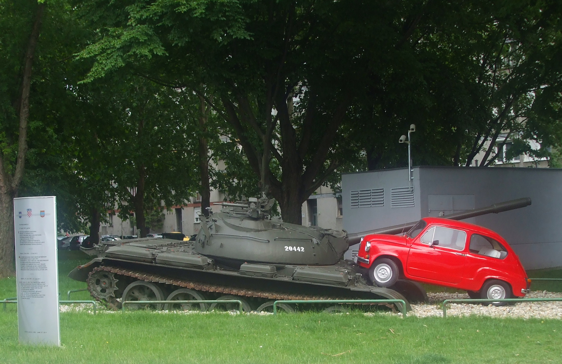 Umjetnička instalacija na križanju Vukovarske i Trpimirove ulice u Osijeku.